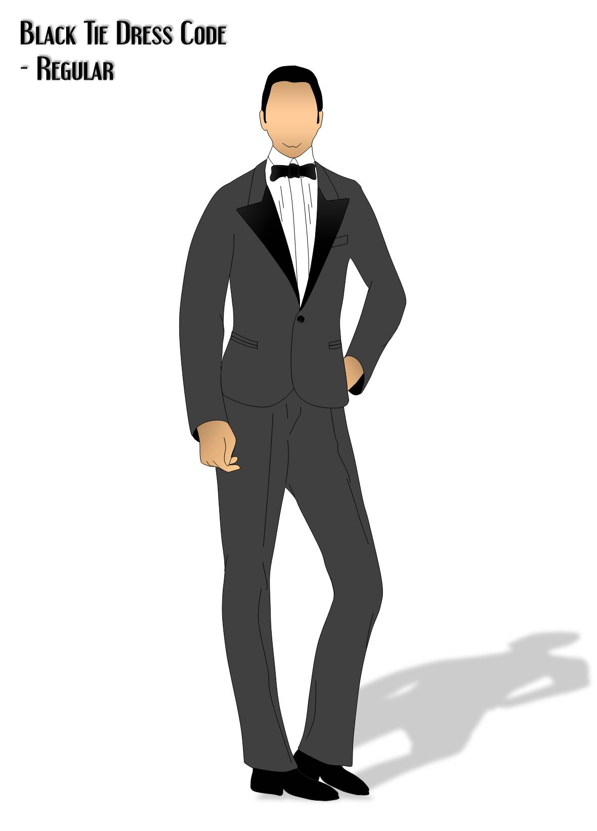 Smoking / Black Tie Kleiderordnung (Regular=Black Dinner Jacket)